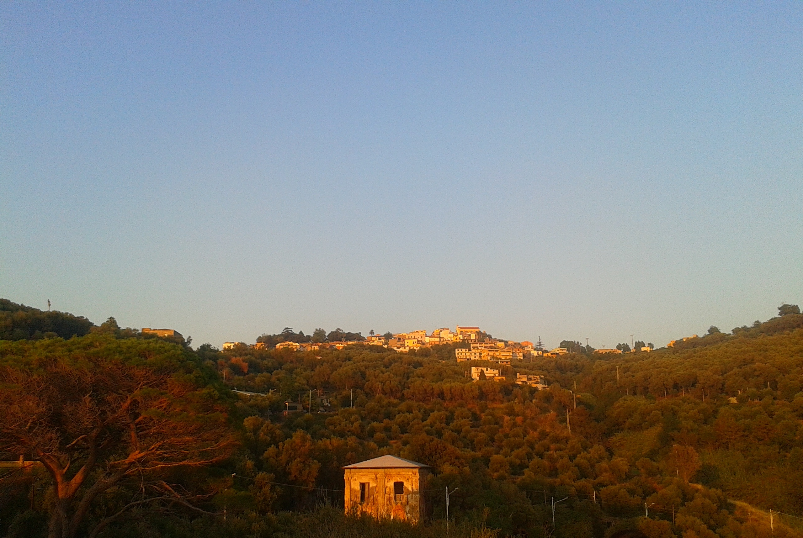 Palmi. Il rione Cittadella fotografato dalla località Motta.